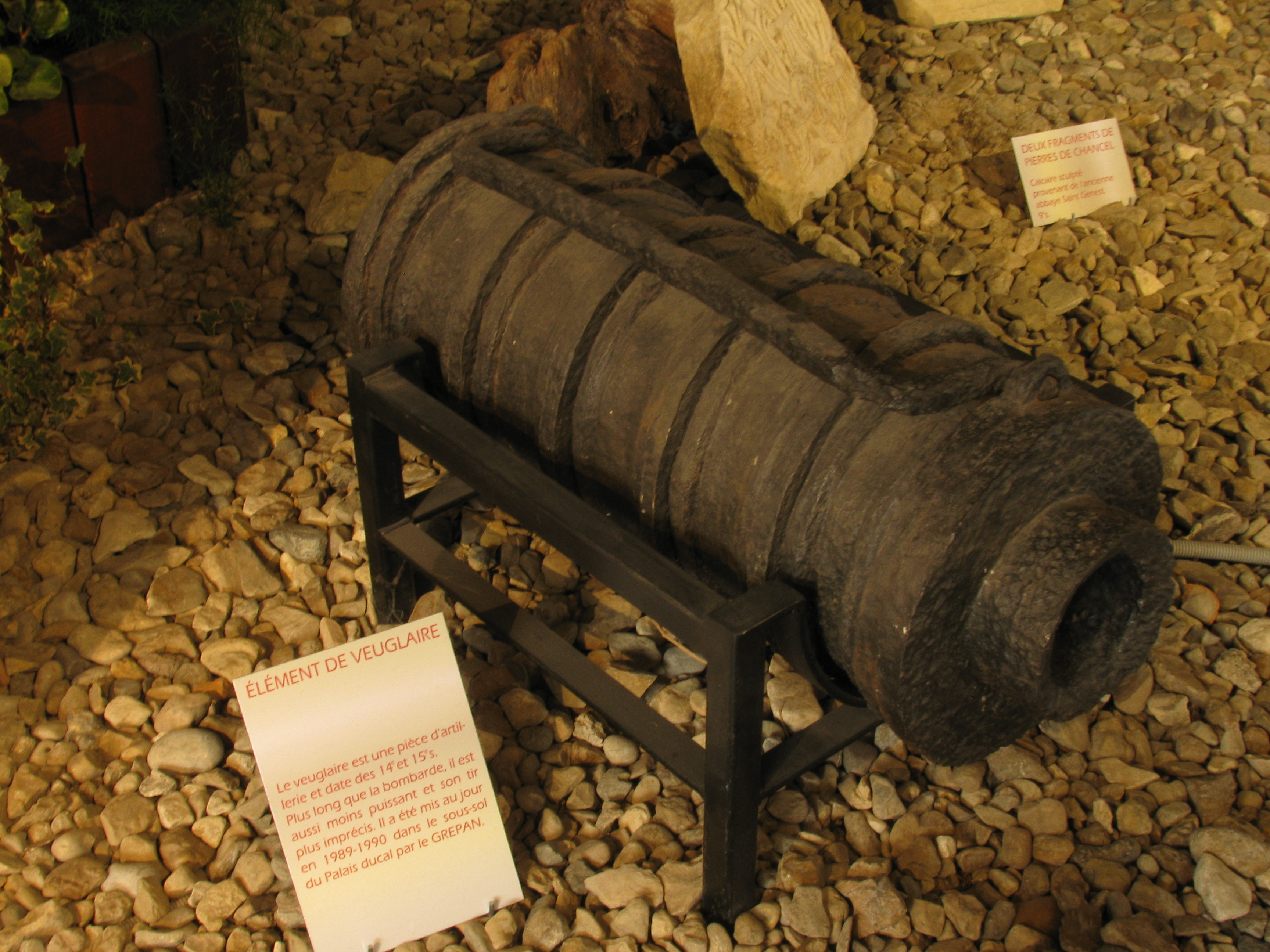 Élément de veuglaire (XIVe-XVe siècle), mis au jour en 1989-1990 lors de fouilles sur le site du palais ducal de Nevers (Nièvre). Visible à l'office de tourisme de Nevers (Palais ducal)